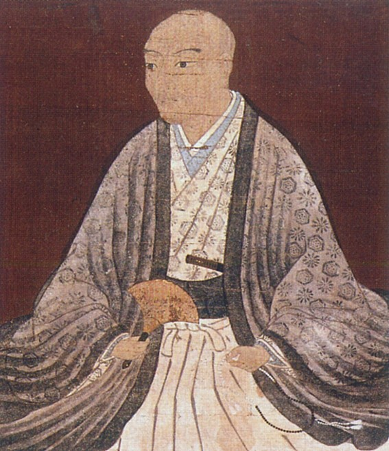 生駒親正。Ikoma Chikamasa.